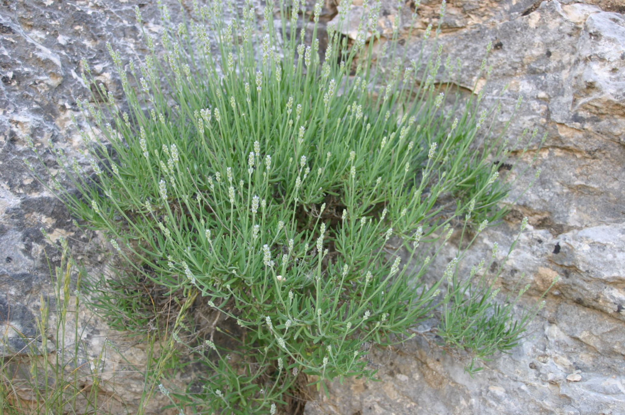 Lavandula angustifolia on Mont Ventoux